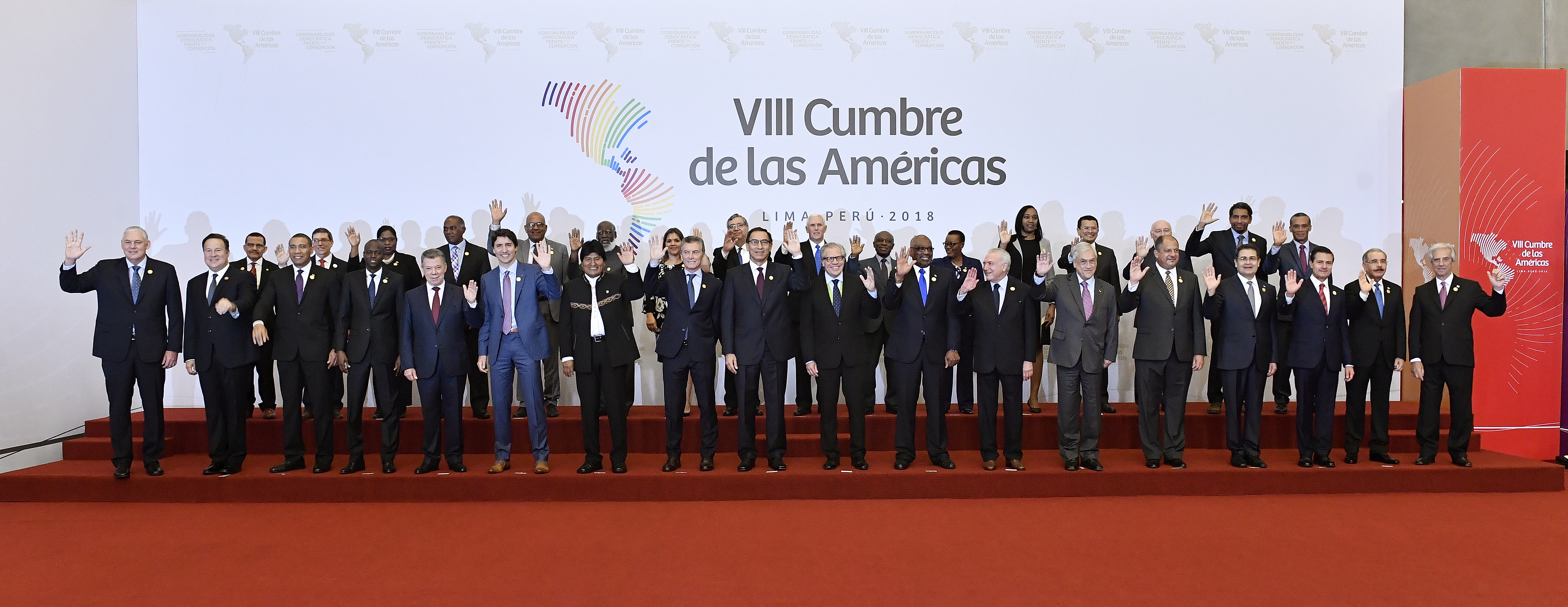 Fotografía oficial VIII Cumbre de las Américas (Presidentes y Jefes de Estado)